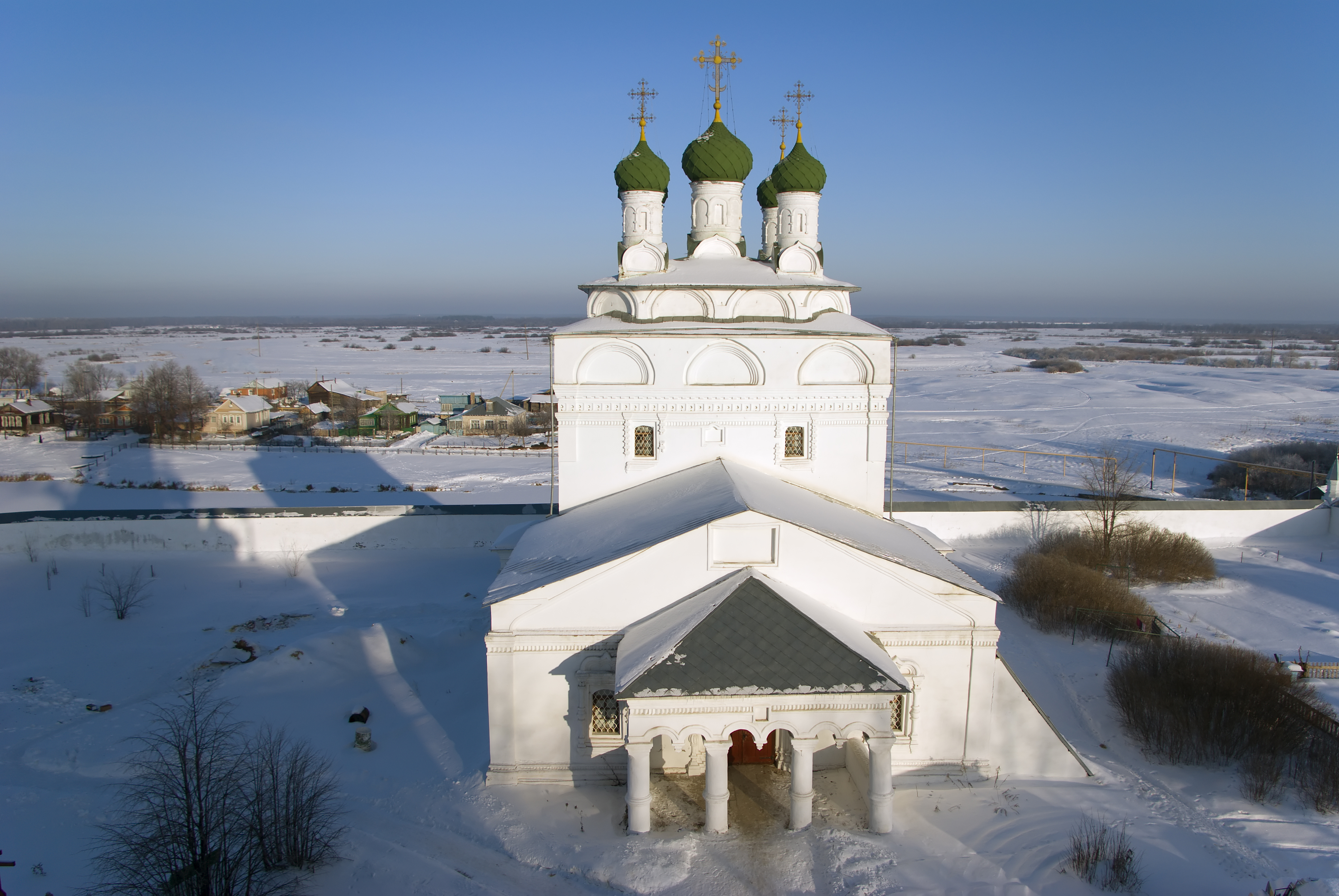 Церковь во имя Богоявления Господня